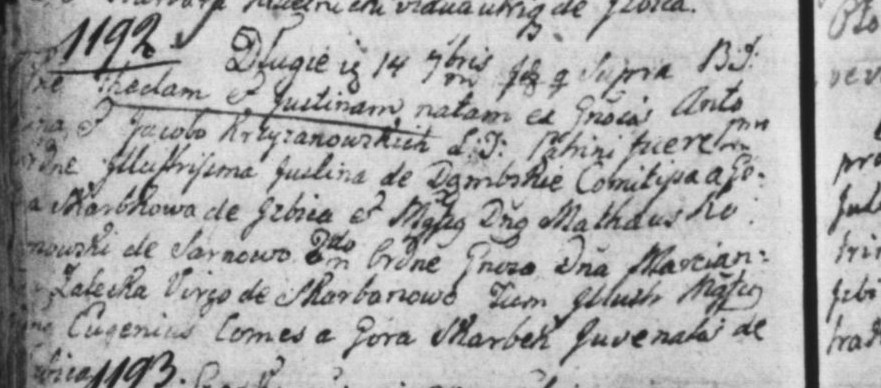 wycinek